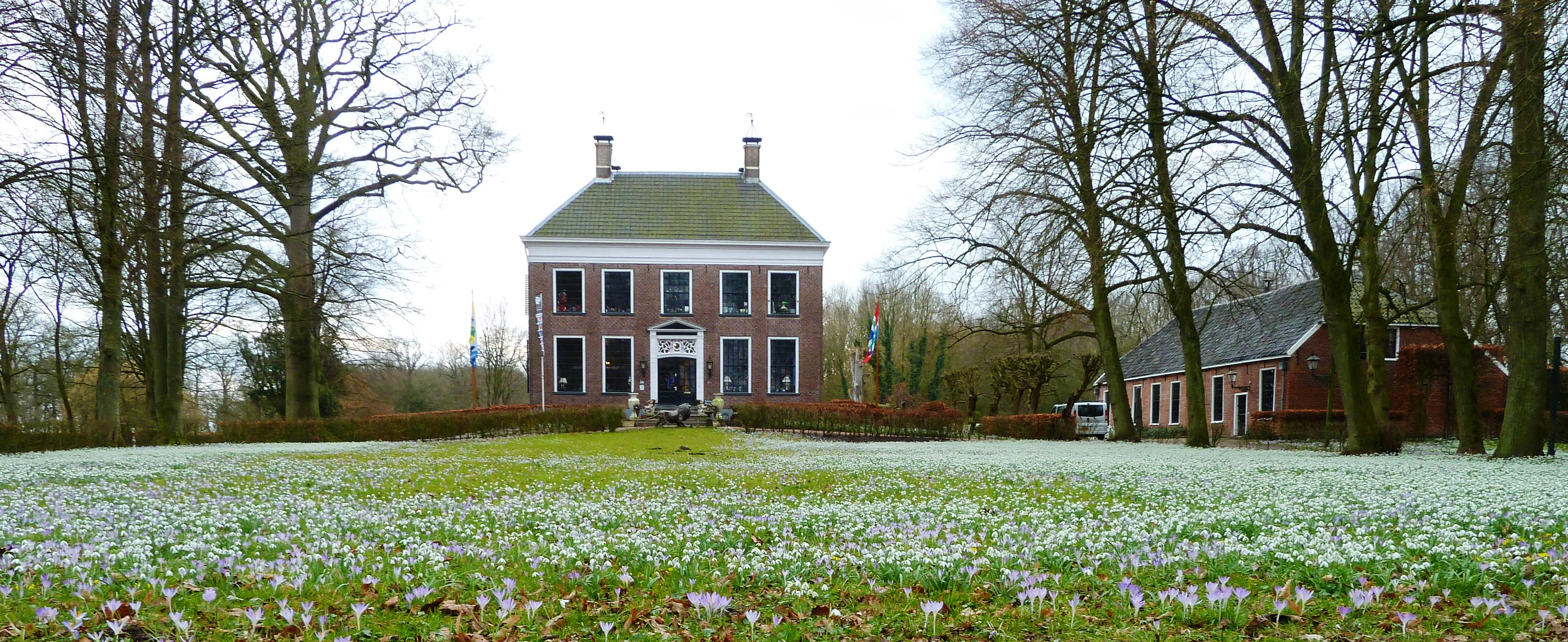 Ennemaborg met de stinsenflora in bloei.